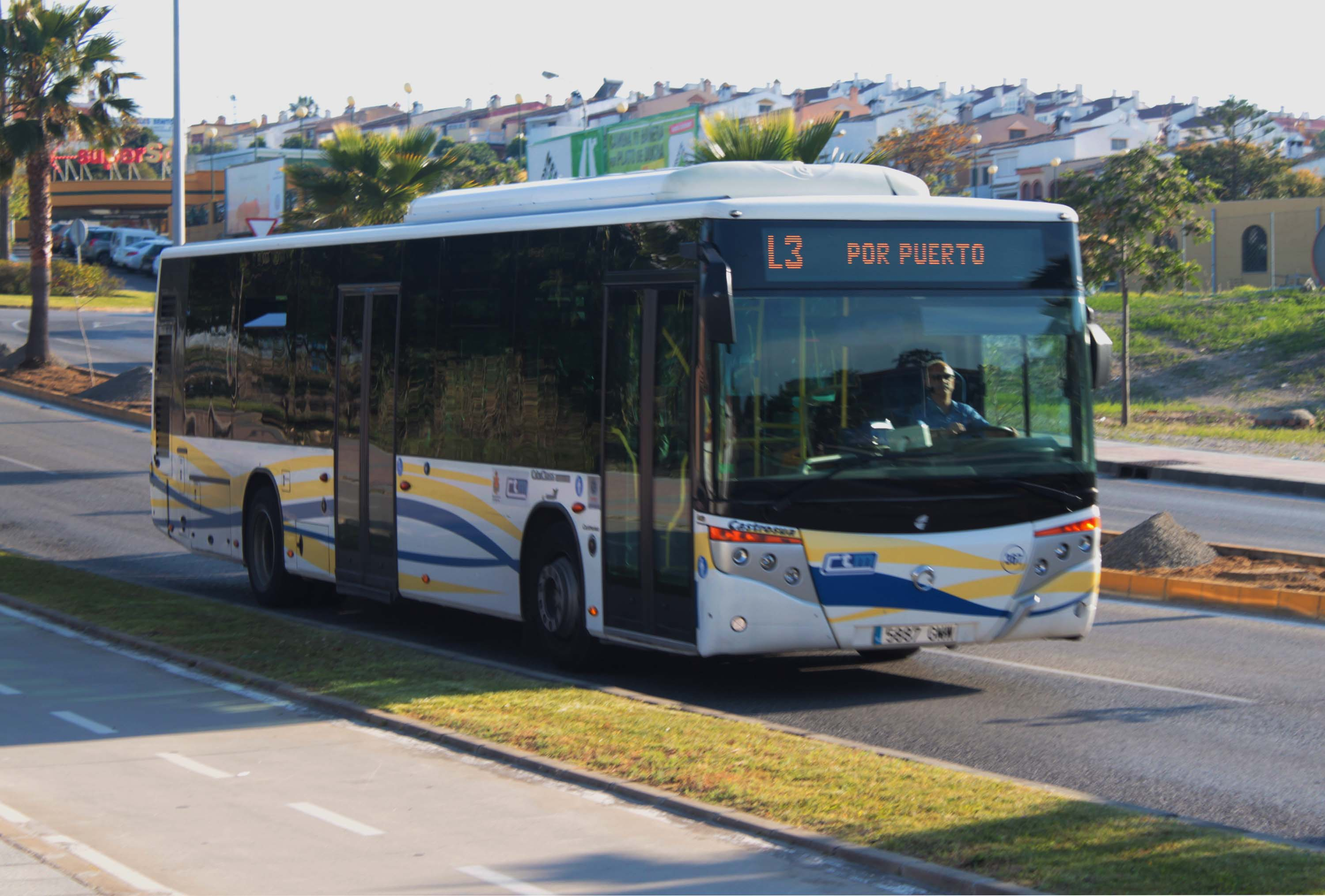 Autobús urbano de la localidad española de Algeciras.